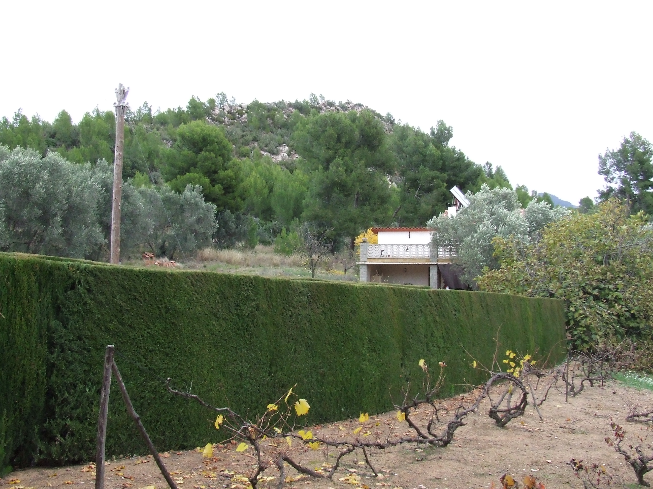 Can Xifreda (Riells del Fai, Bigues i Riells, Vallès Oriental)